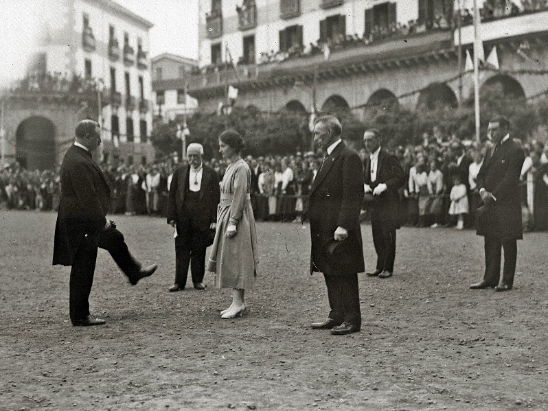 Celebración del I Congreso Internacional de Estudios Vascos de Eusko Ikaskuntza en la localidad de Oñate